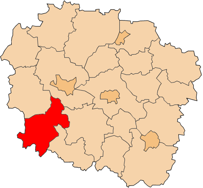 Powiat żniński na mapie województwa kujawsko-pomorskiego.